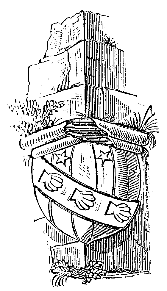 Armes de la famille de Grandson-La Sarraz, p. 120